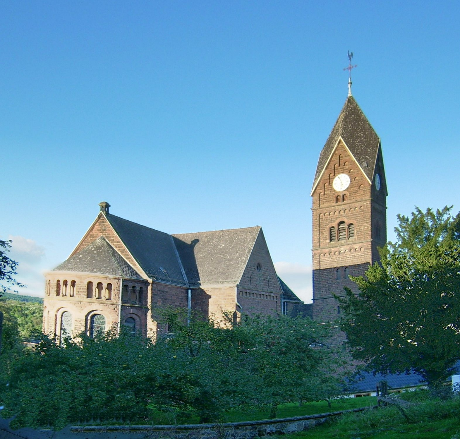 Kirche in Fremersdorf